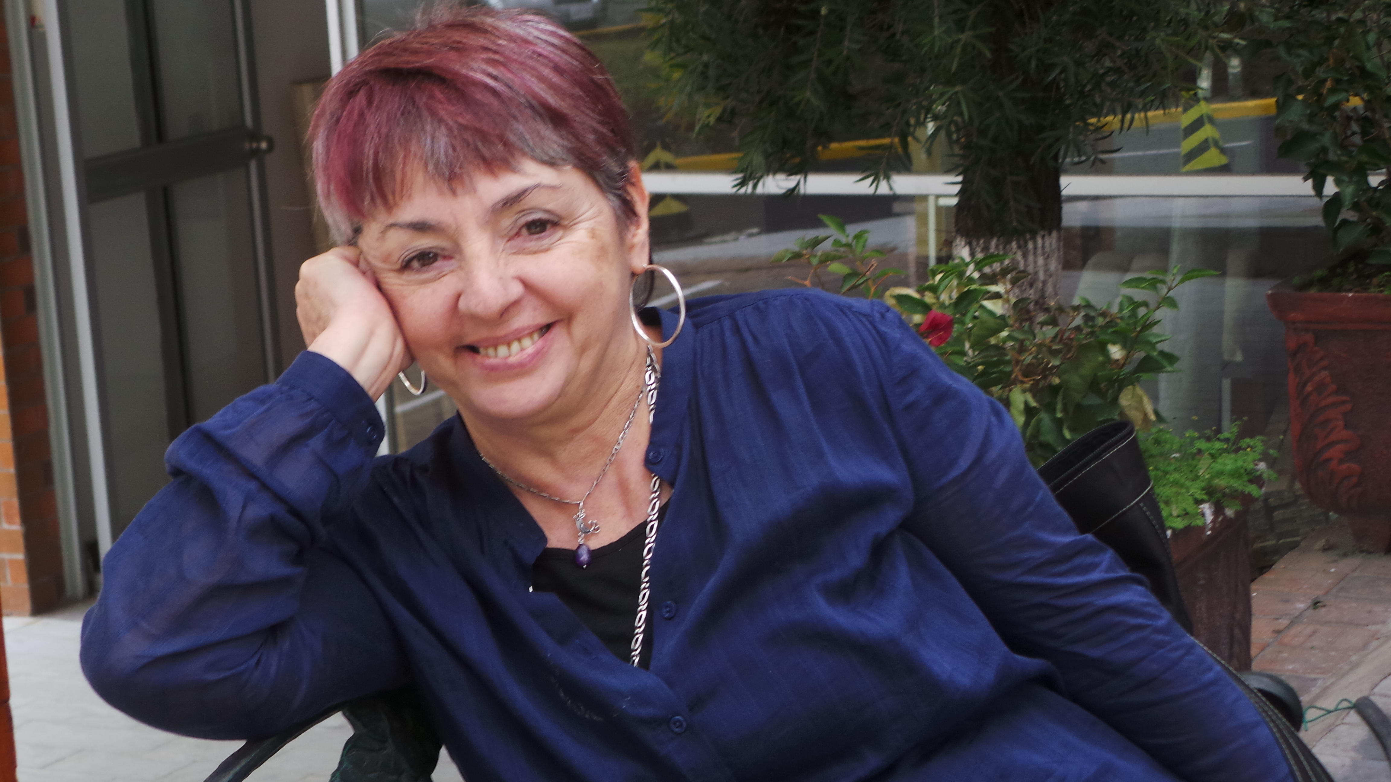 Economista especialista en geopolítica. Pensadora del buen vivir. Investigadora Universidad Nacional Autónoma de México, Directora del Observatorio Latinoamericano de Geopolítica